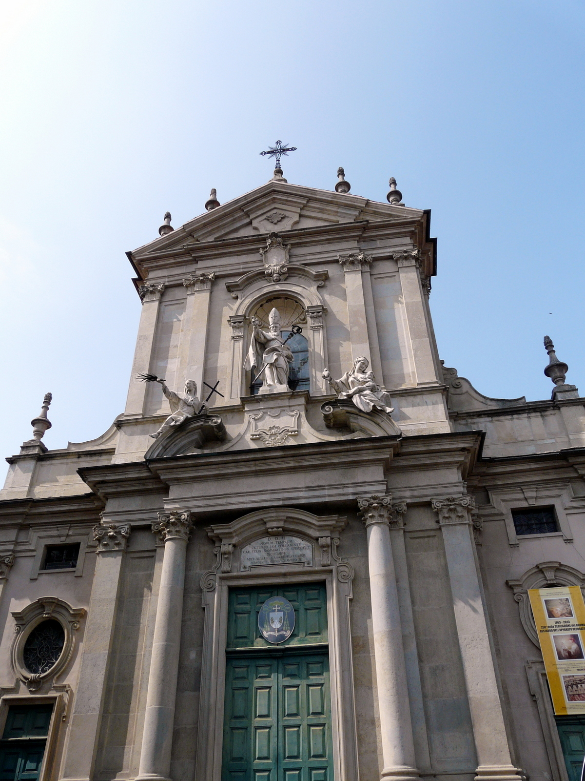 La cattedrale, Borgata di Piazza, Mondovì, Piemonte, Italia